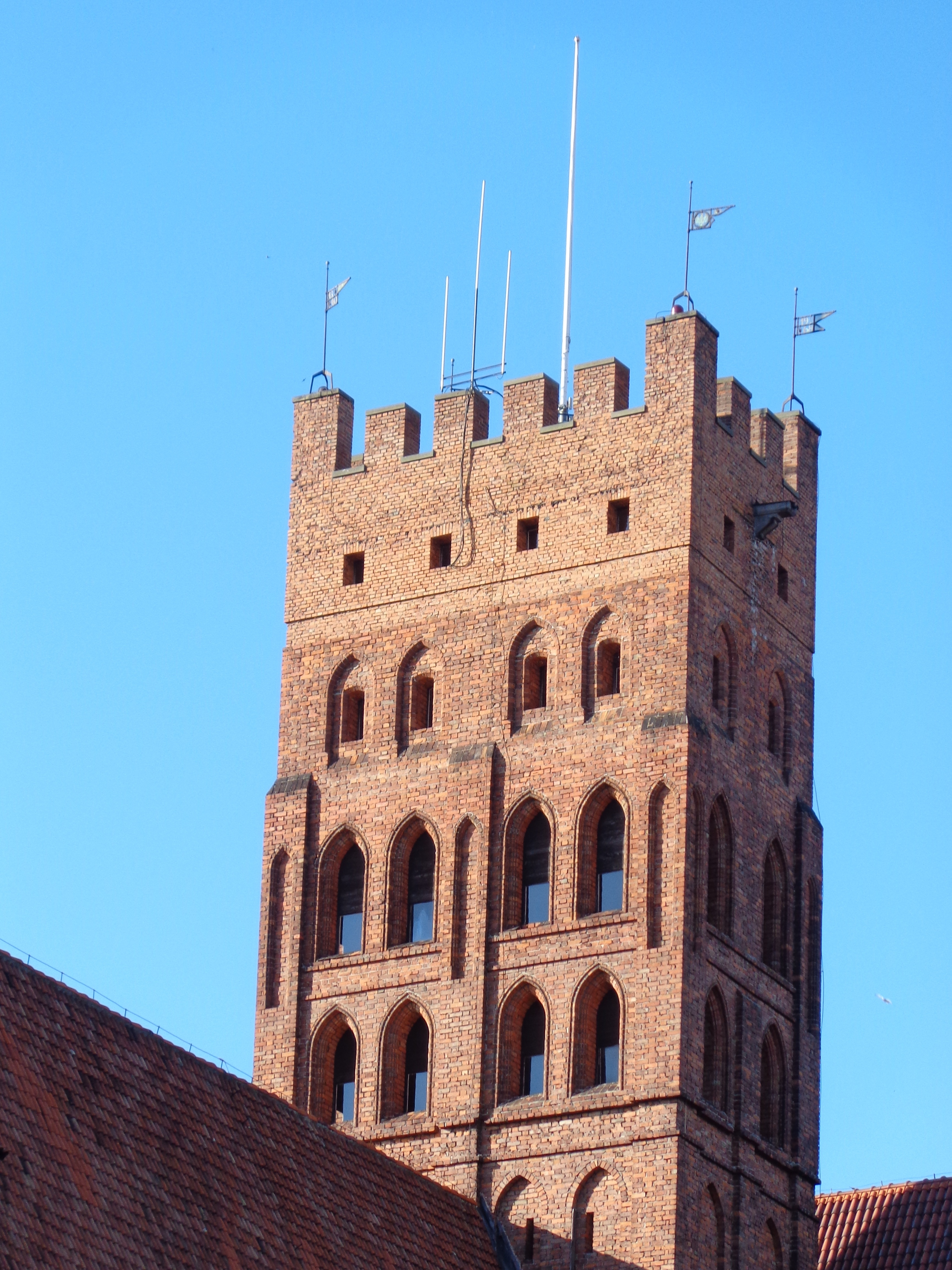 Malbork, zespół zamku krzyżackiego, XIII, XIX